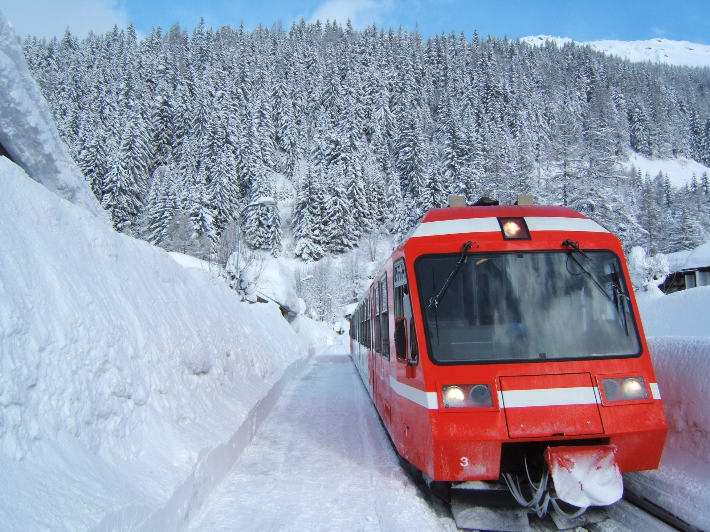 Ligne SNCF Saint-Gervais - Vallorcine. France.